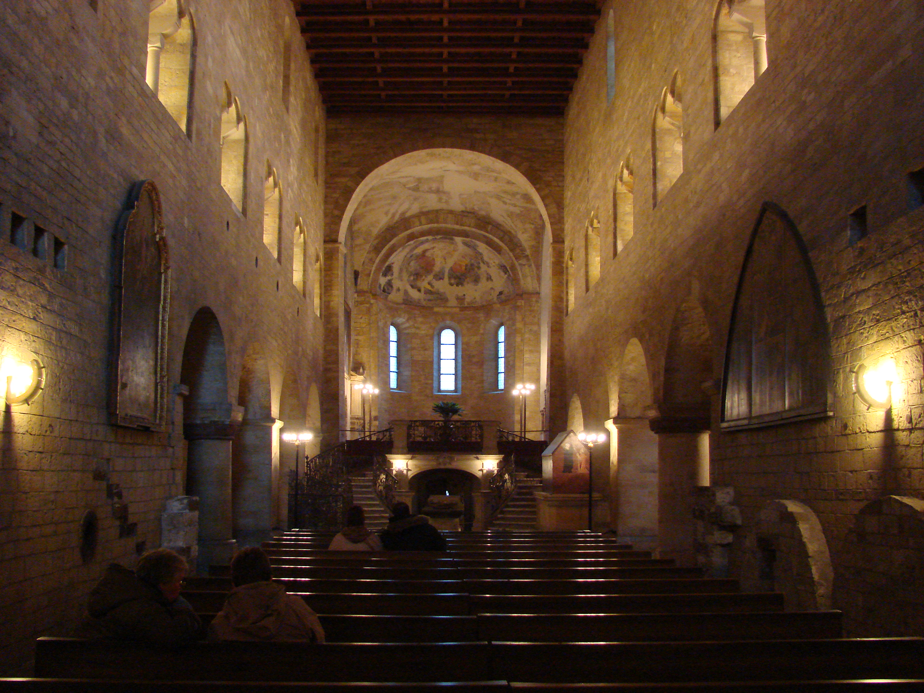 Pražský hrad, Bazilika svatého Jiří